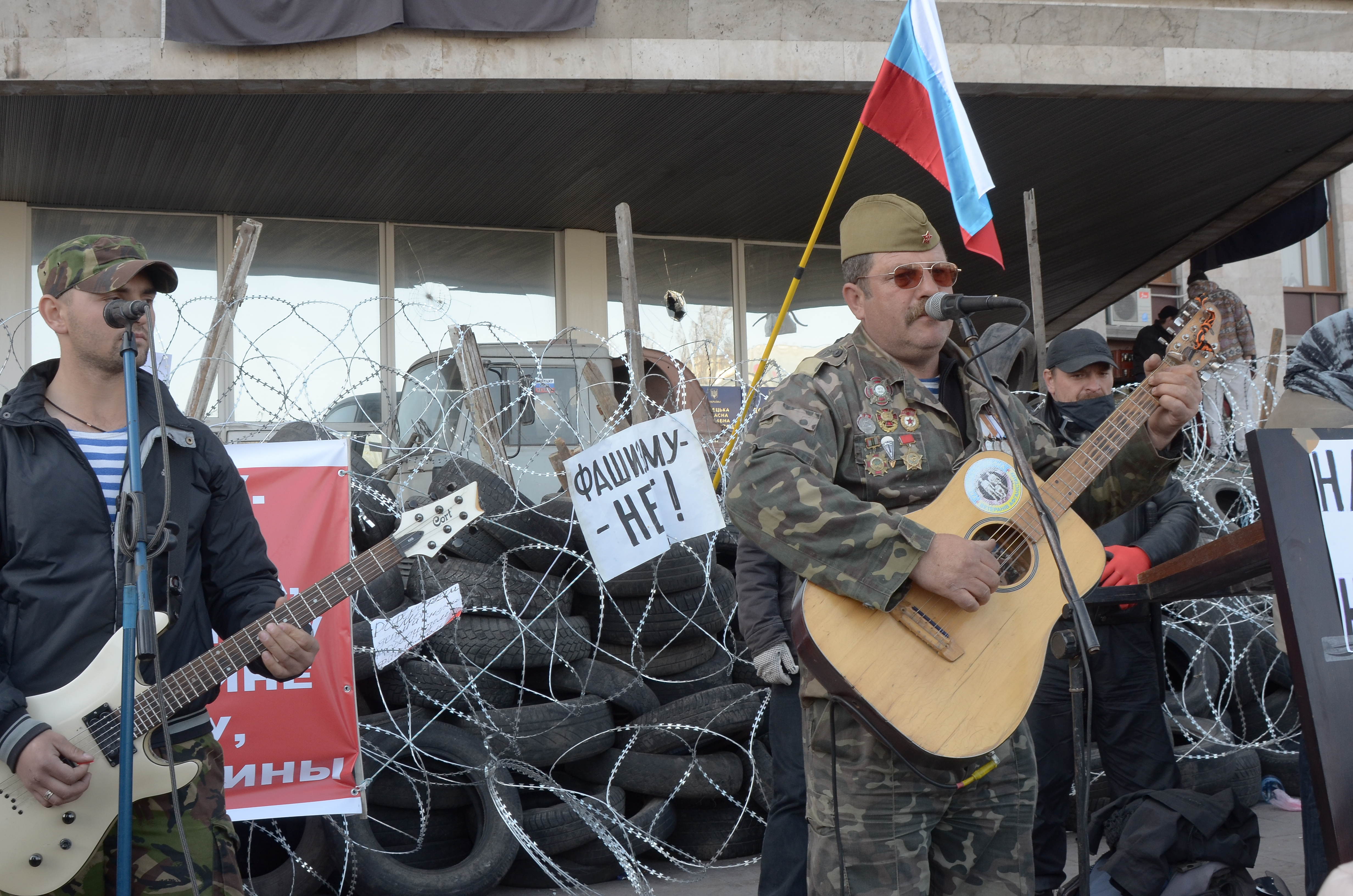 Протесты в Донецке